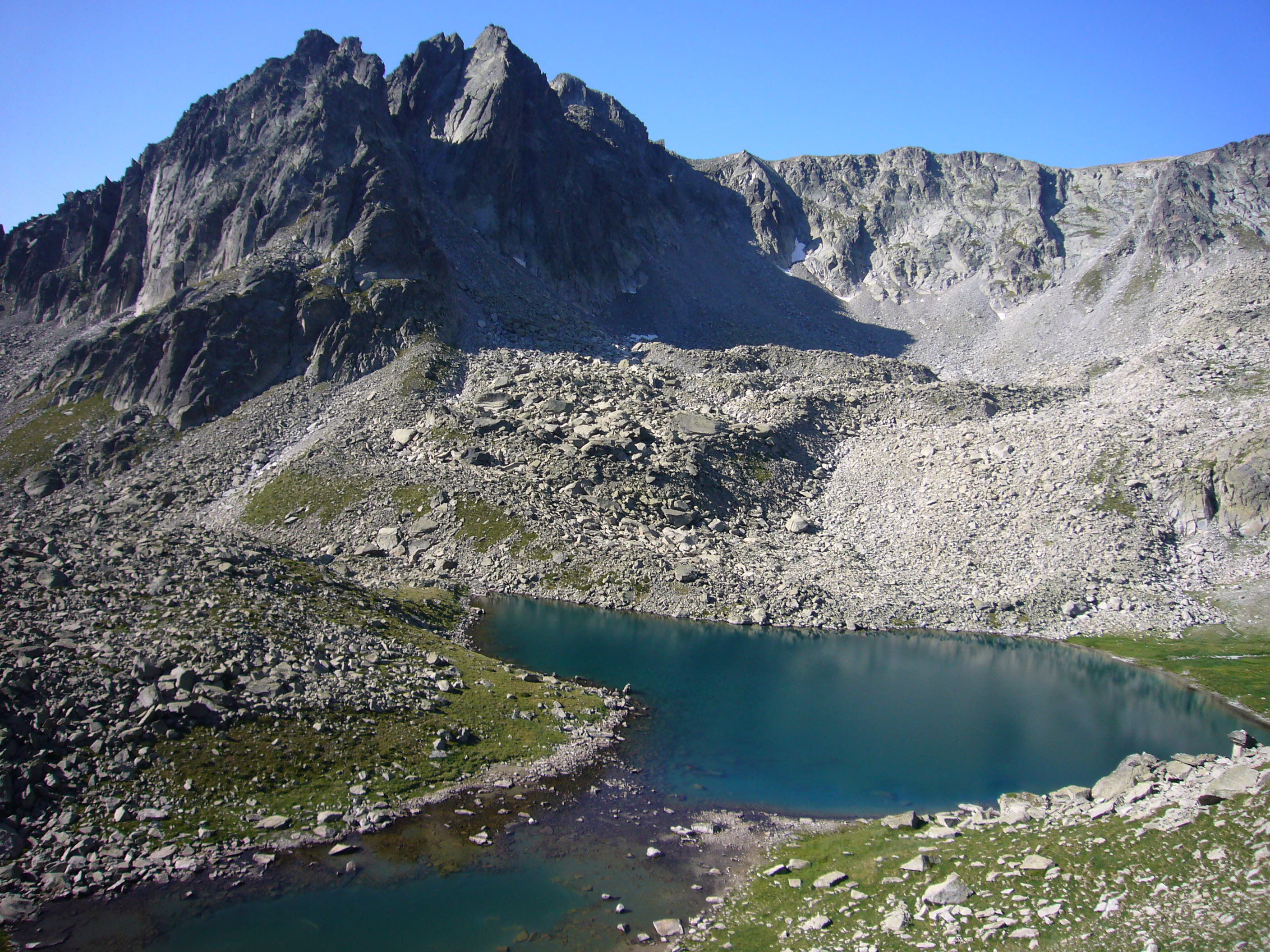 Estany de Port de Ratera, Gran Tuc de Crabes i Agulles de Crabes, vistos des del camí del Port de Ratera; Espot, Pallars Sobirà, Catalunya